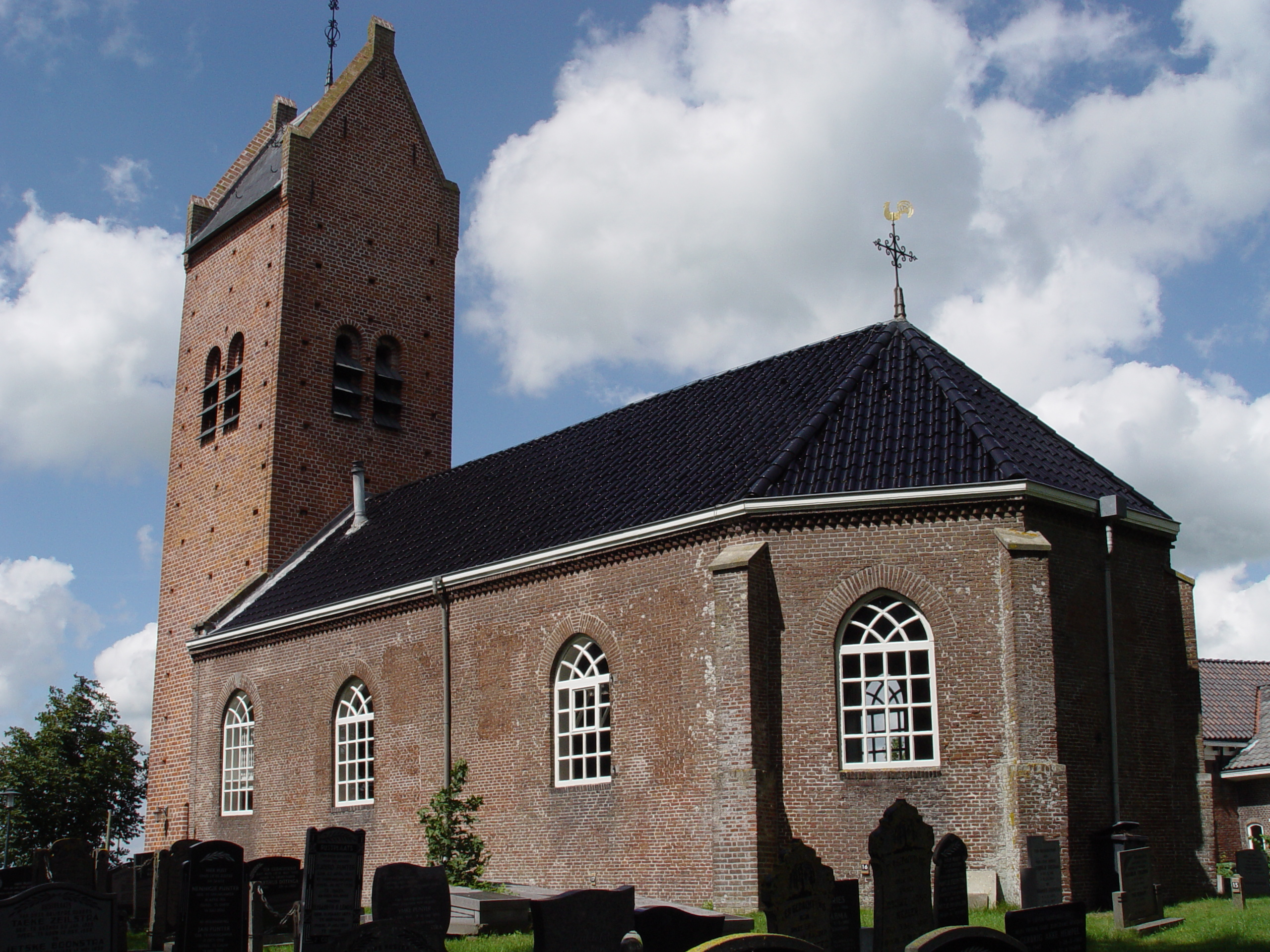 Gauw (Fr) NH kerk uit de 13e eeuw